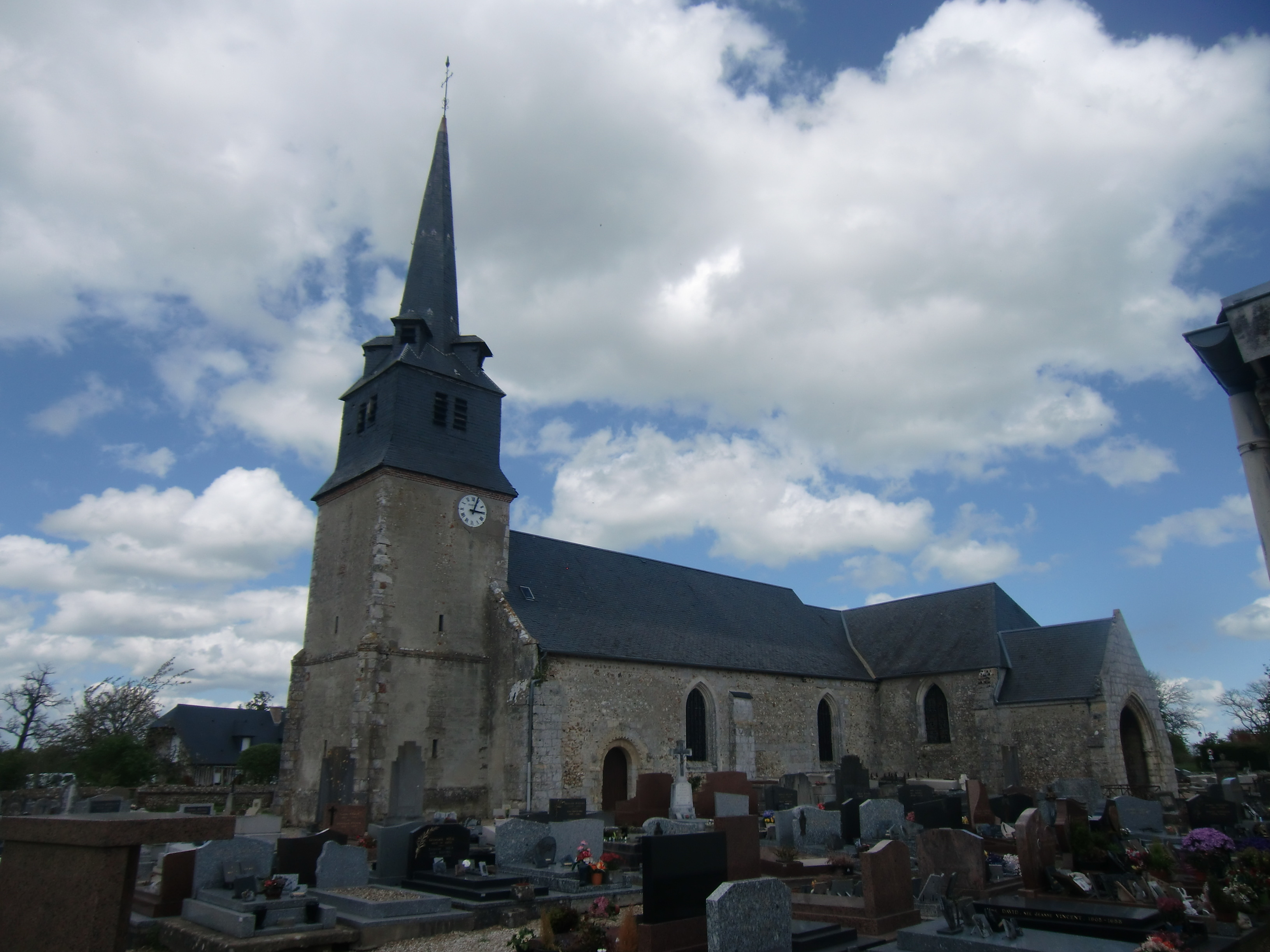 Eglise de Fatouville-Grestain (Eure - Normandie - France)